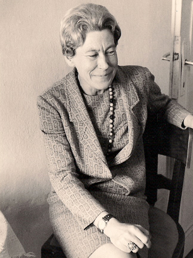 Wanda Leopold, portret